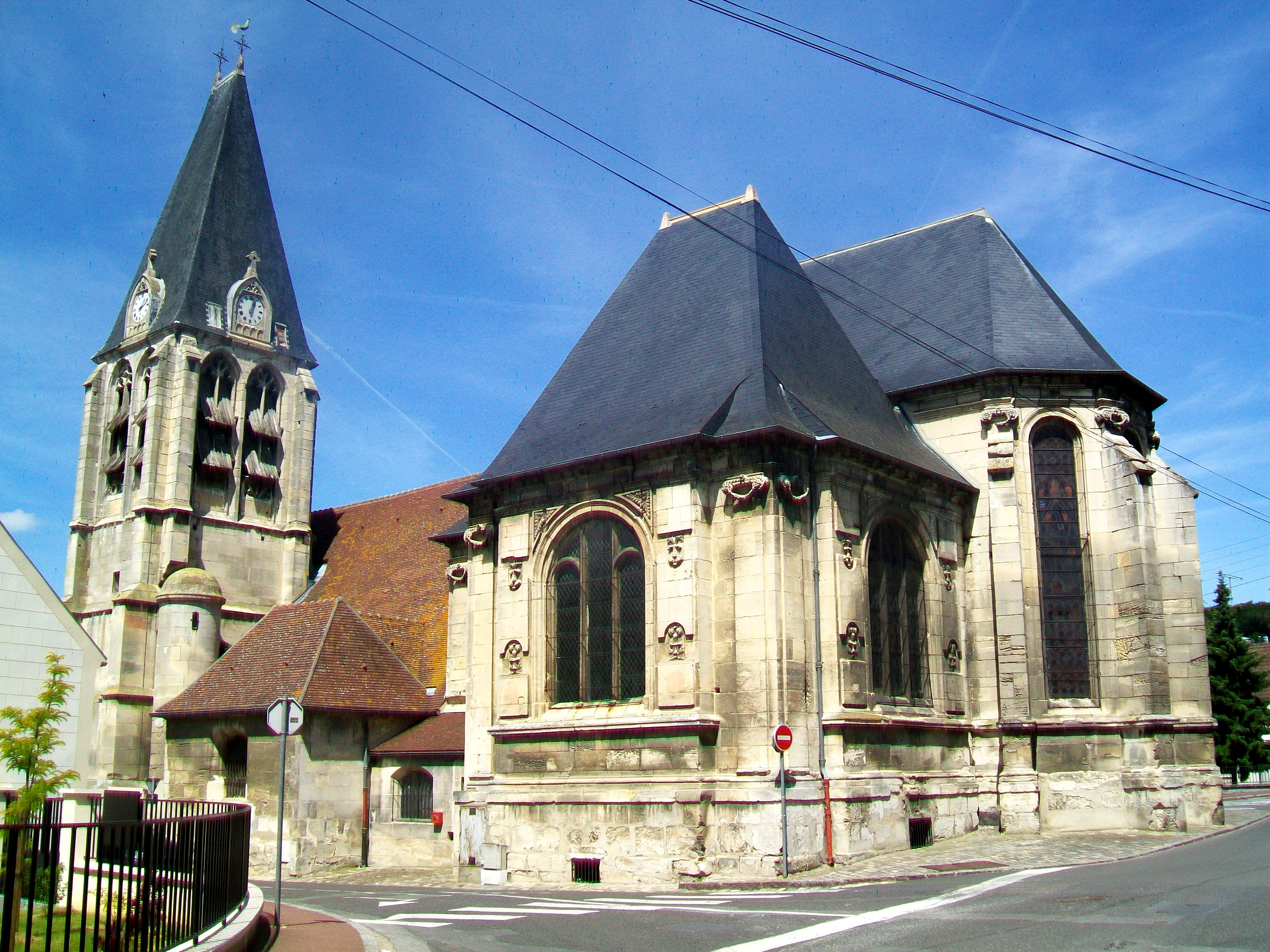 L'église Saint-Martin depuis le sud-est ; transept et chœur Renaissance au premier plan.